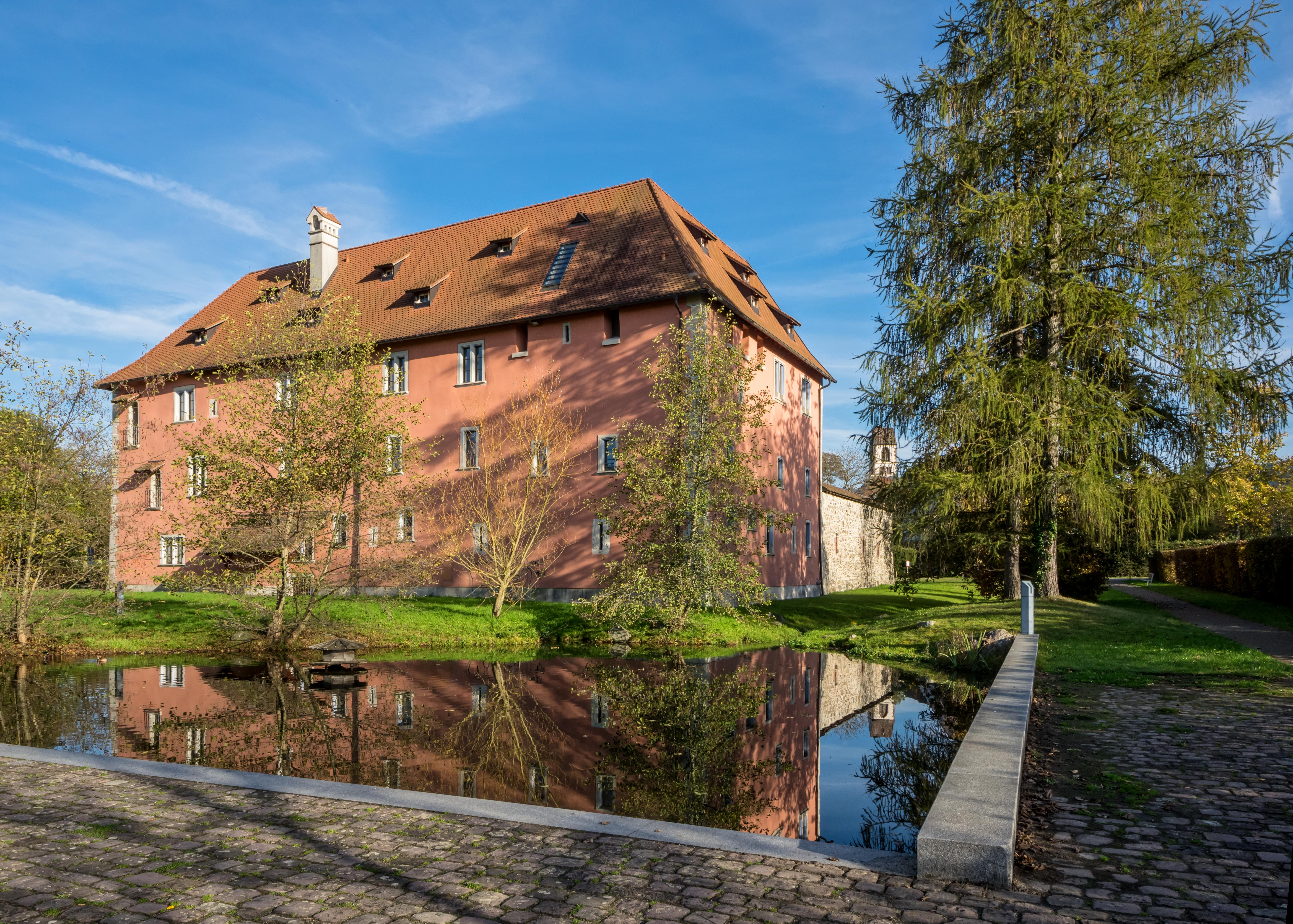 Bilder aus Kirchzarten Talvogtei